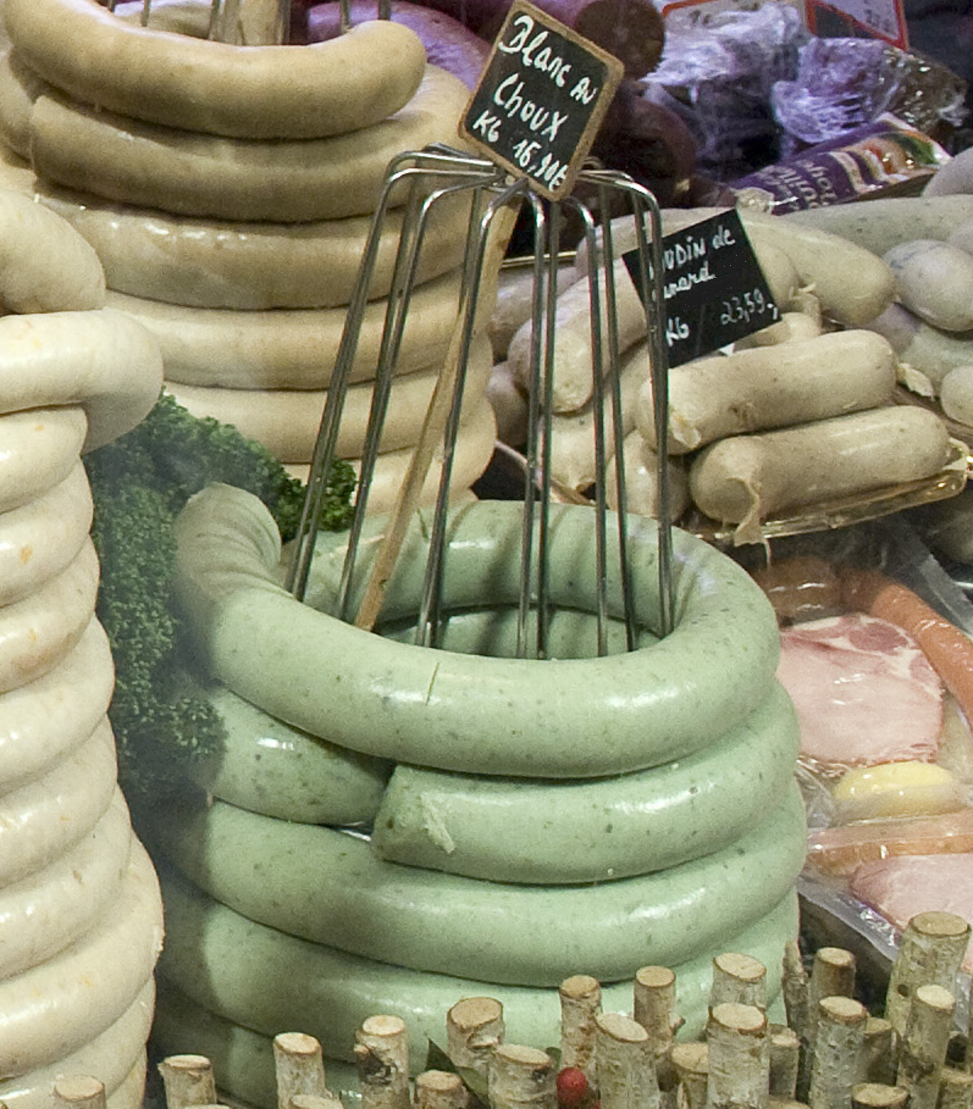 Boudin blanc au chou